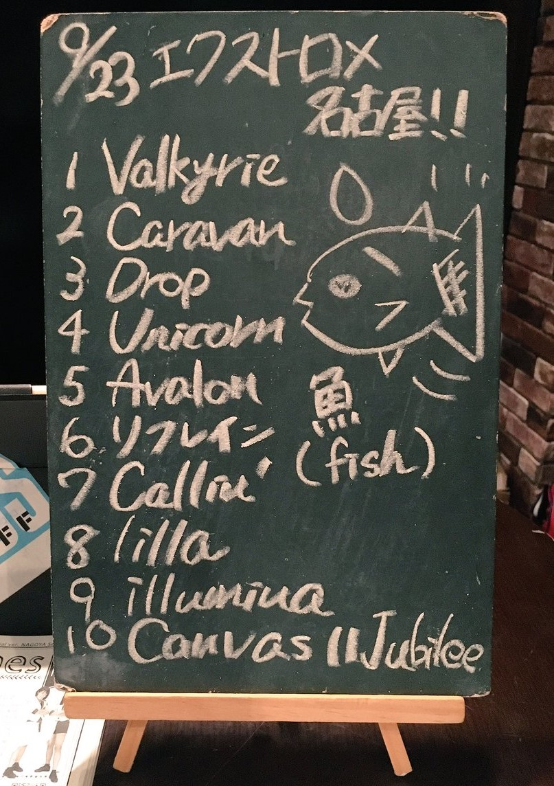 amiinAセトリボード(20180923(1))